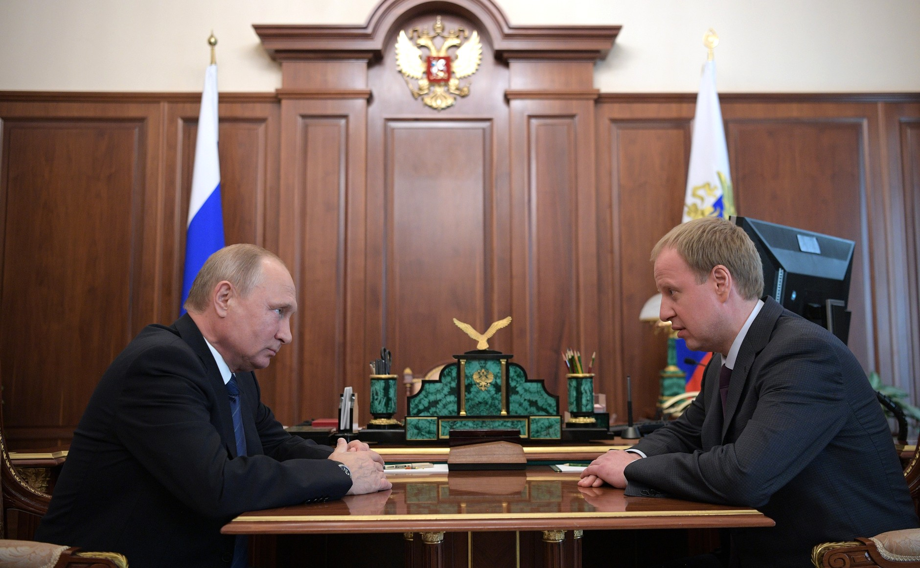 Рабочая встреча с Виктором Томенко. Президент подписал Указ о назначении В.Томенко временно исполняющим обязанности губернатора Алтайского края.